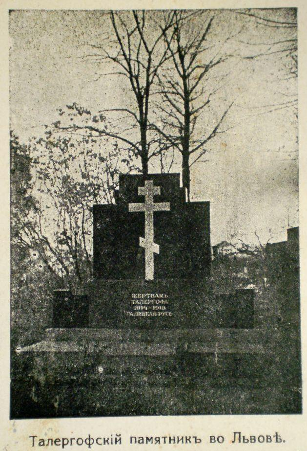 Монумента жертвам Талергофа во Львове на Лычаковском кладбище сразу после сооружения в 1934 году. Открытка на паспарту.